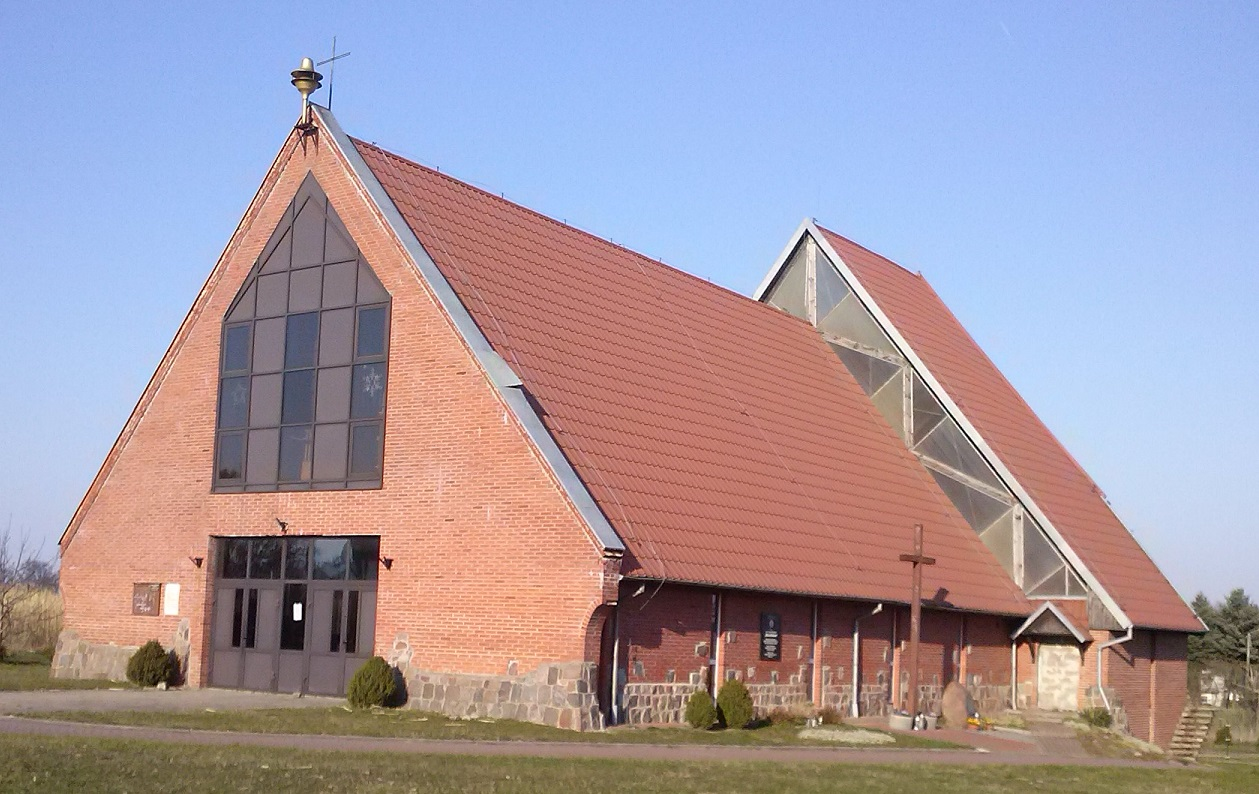 Kościół św. Królowej Jadwigi w Czerninie